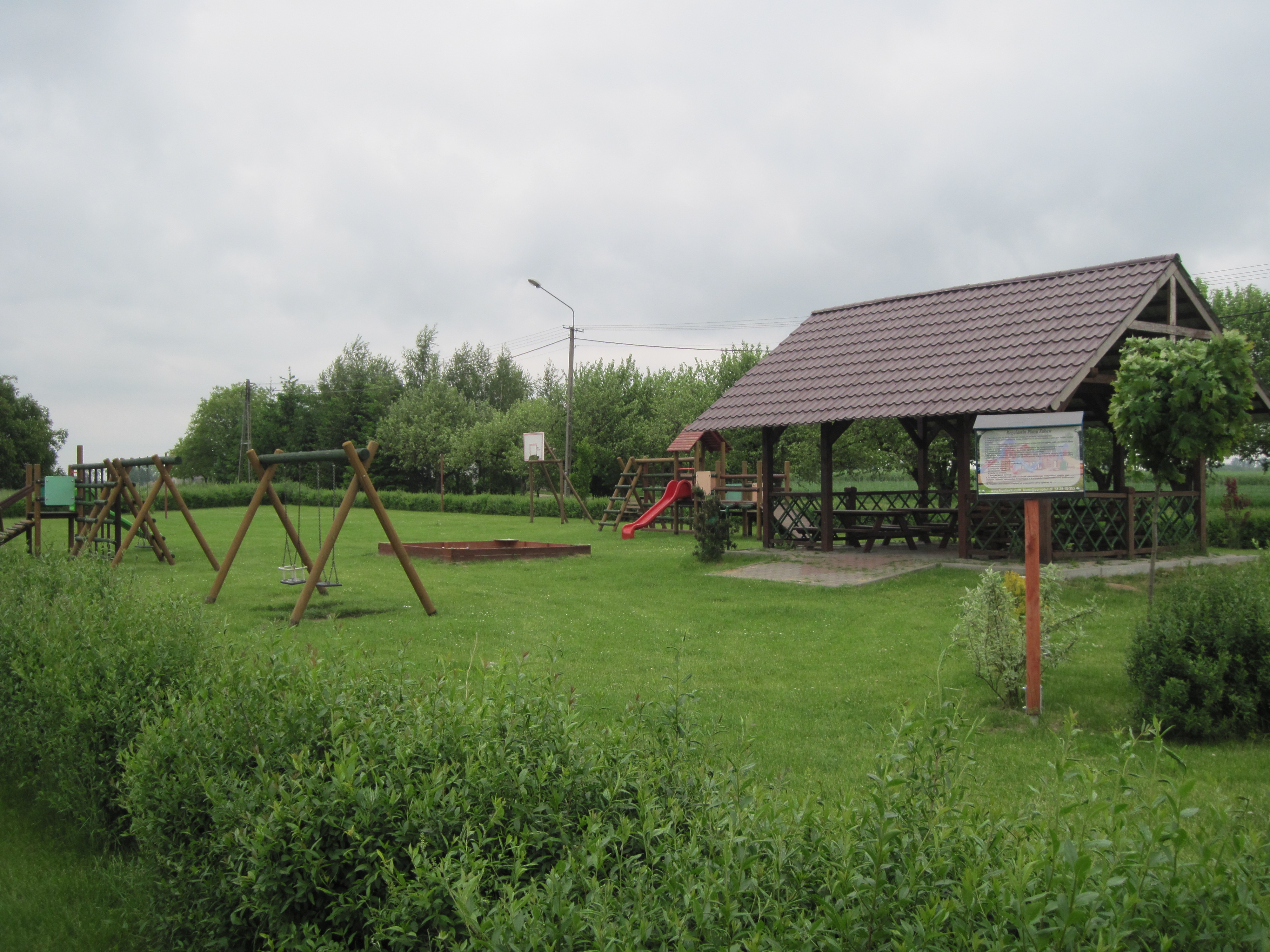 Plac zabaw w Ośnie Drugim